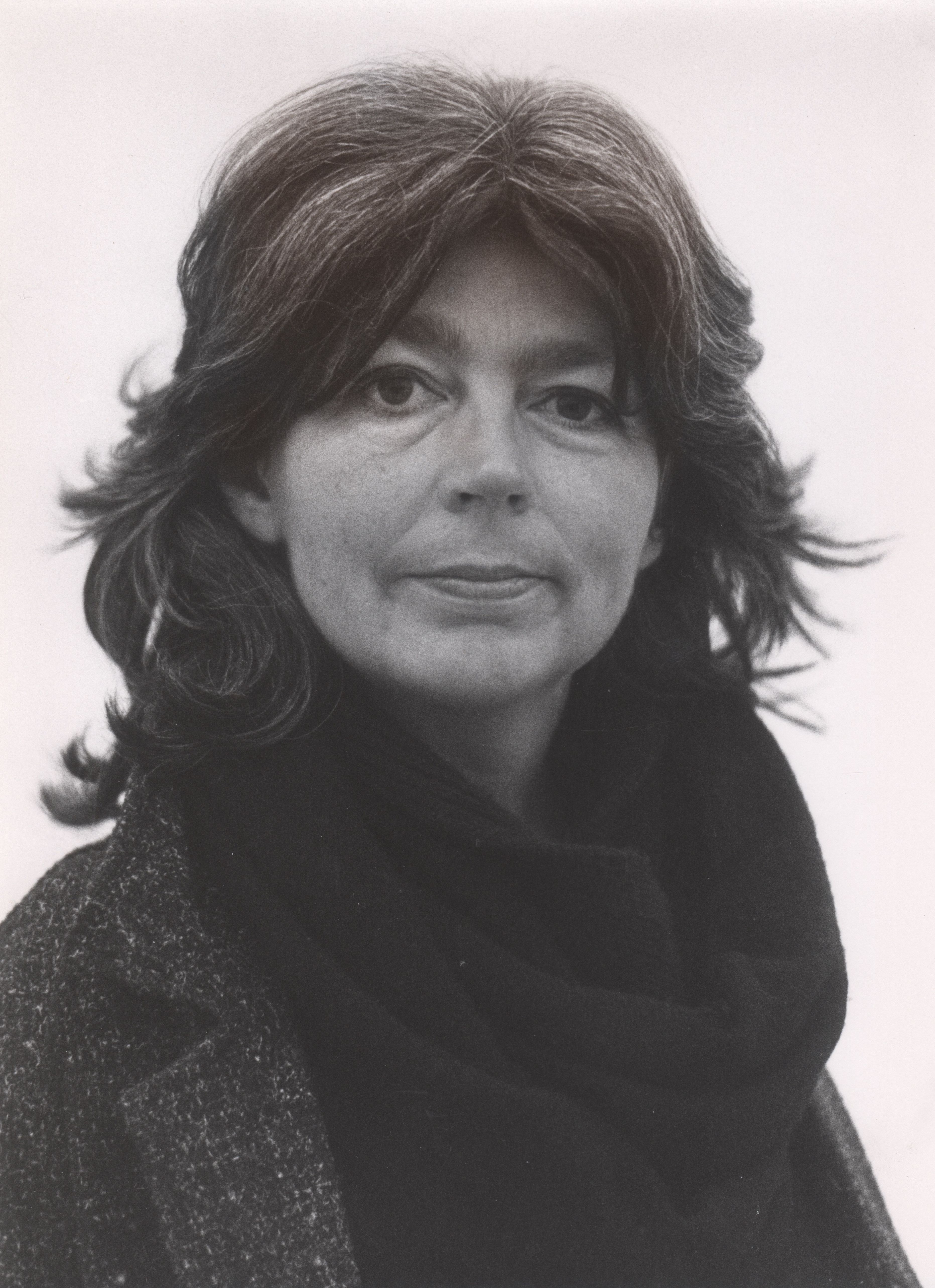 Leni Robert, schweizerische Politikerin